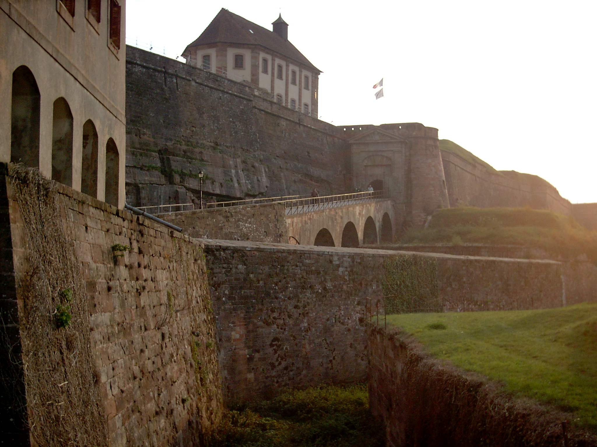 Die Kasematte von Bitche (Teilansicht)